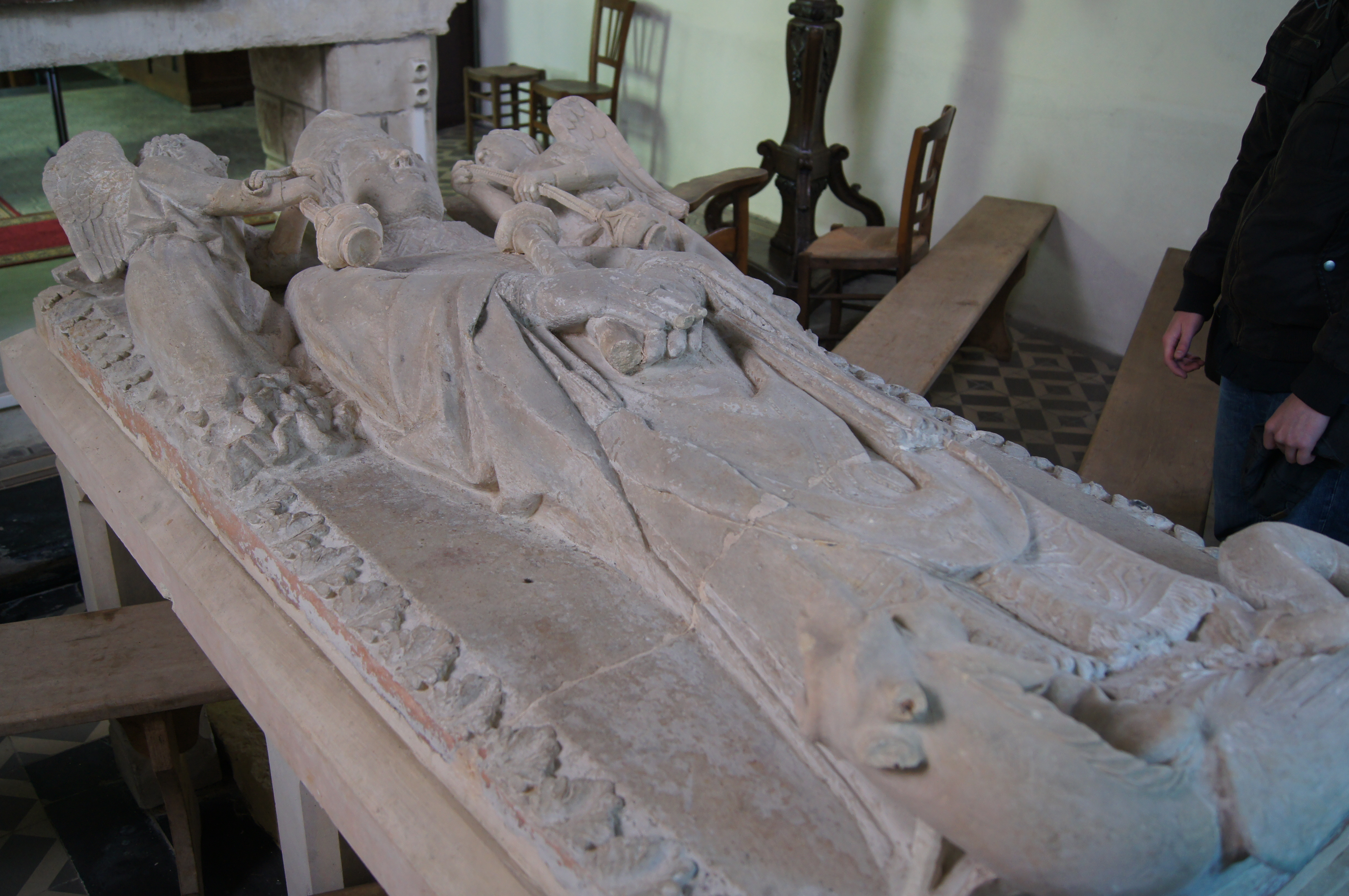 Gisant gauche Saint-Germain d'Ecosse Eglise Saint-Germain de Saint-Germain-sur-Bresle